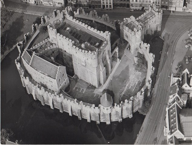 Sint-Veerleplein Gravensteen